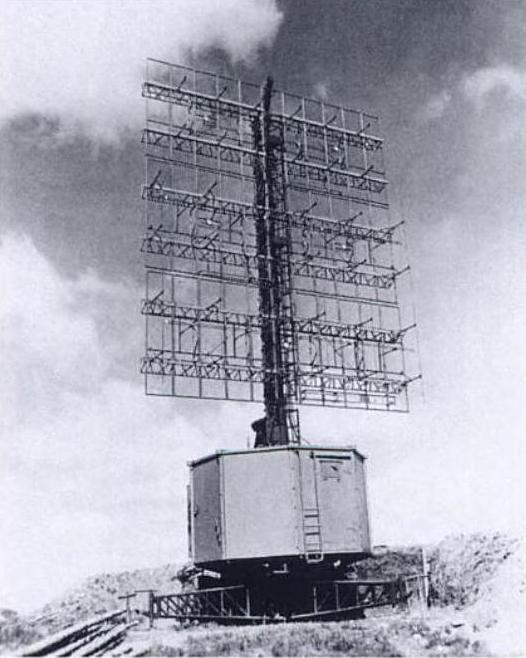 FuMG 401 "Freya LZ" = Lufttransport Zerlegbar